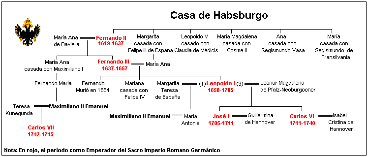 Árbol genealógico de la Casa de Hamburgo